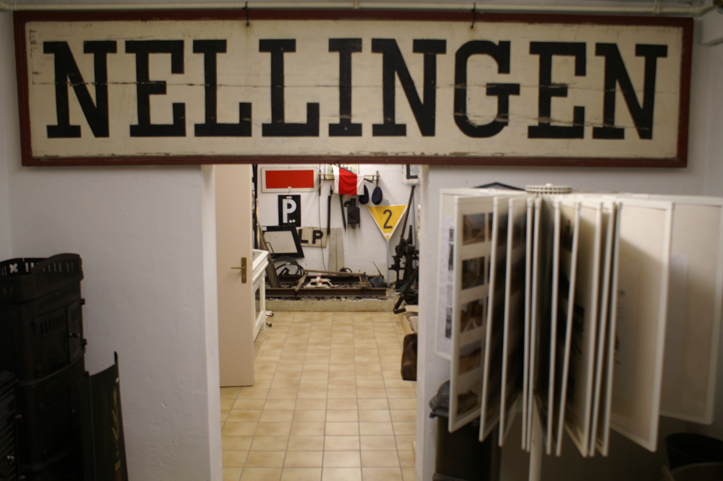 Die Geschichte der im Jahr 1985 stillgelegten Schmalspurbahn Amstetten-Laichingen der Württembergischen Eisenbahn-Gesellschaft ist im Nellinger Heimatmuseum dokumentiert